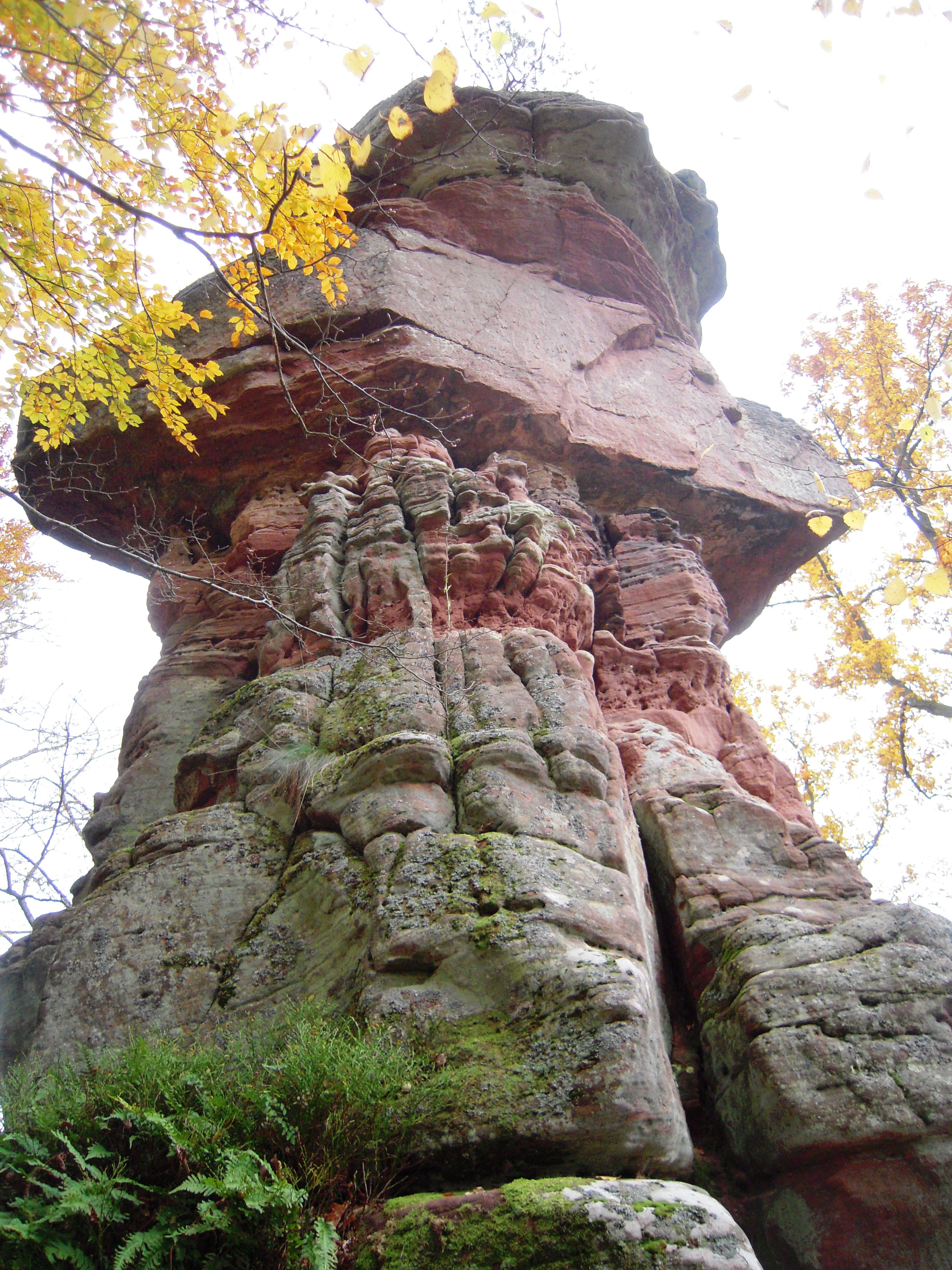 Rocher de grès bigarré près du château de Ramstein, France.